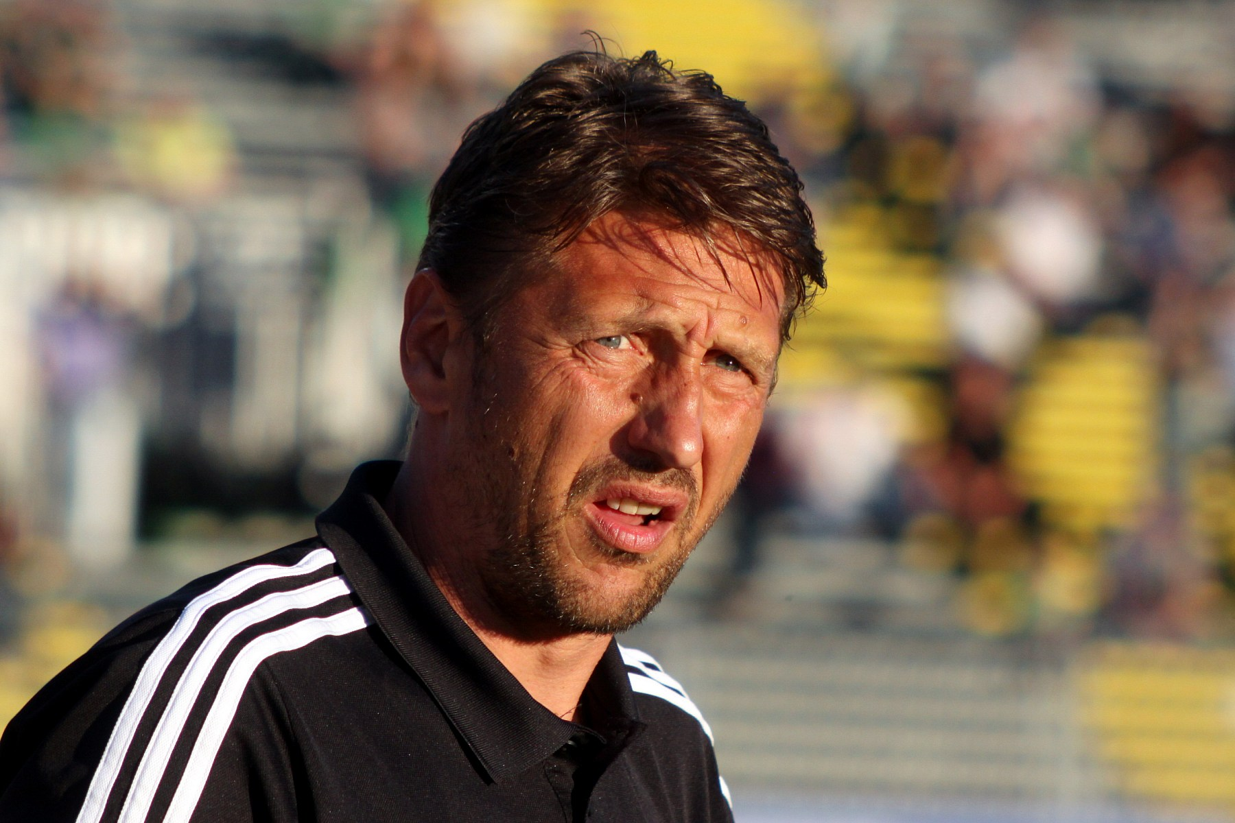 Meisterschaftsspiel der österreichischen Bundesliga: SV Mattersburg gegen SK Rapid Wien am 18. Mail 2013 (2:0)] im Mattersburger Pappelstadion.] - Das Foto zeigt den Trainer des SK Rapid Wien Zoran Barisic.